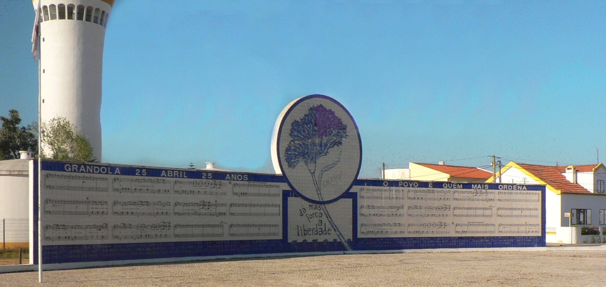 Mural em Grândola contendo a pauta de Grândola Vila Morena by Paulo Juntas